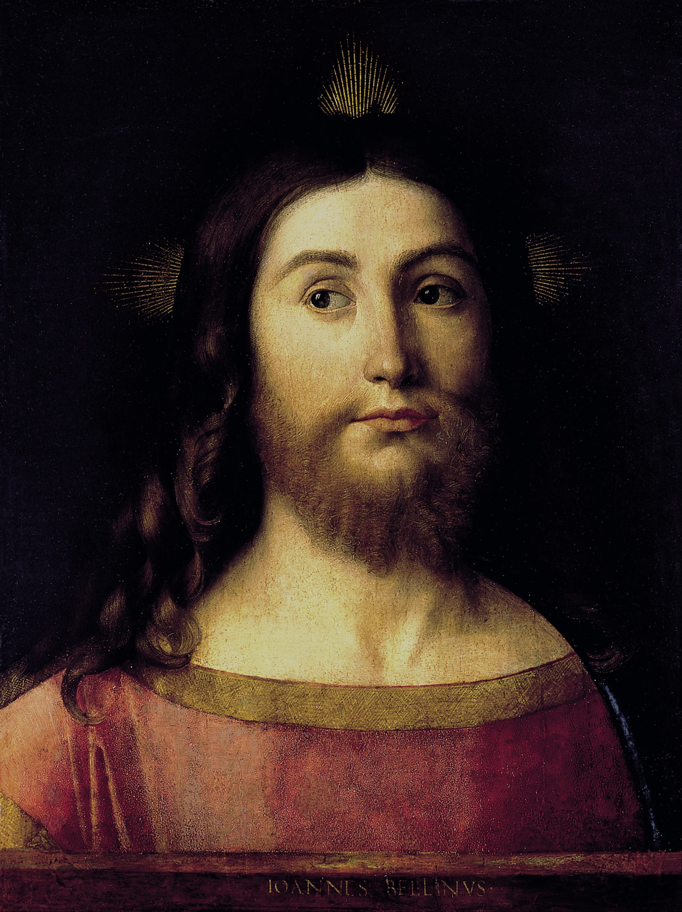 La obra representa a Jesucristo como Salvador del Mundo.